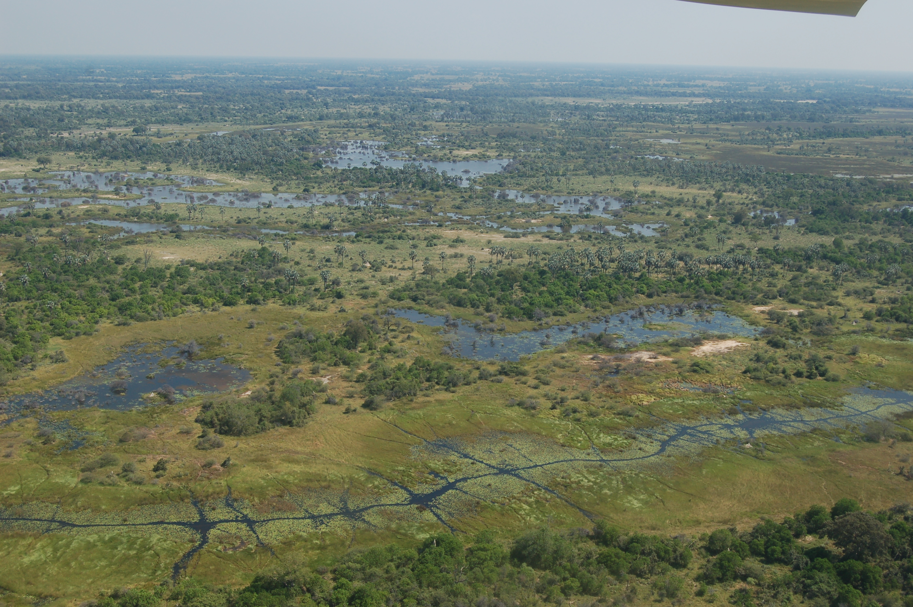 Okavango Delta, Botswana